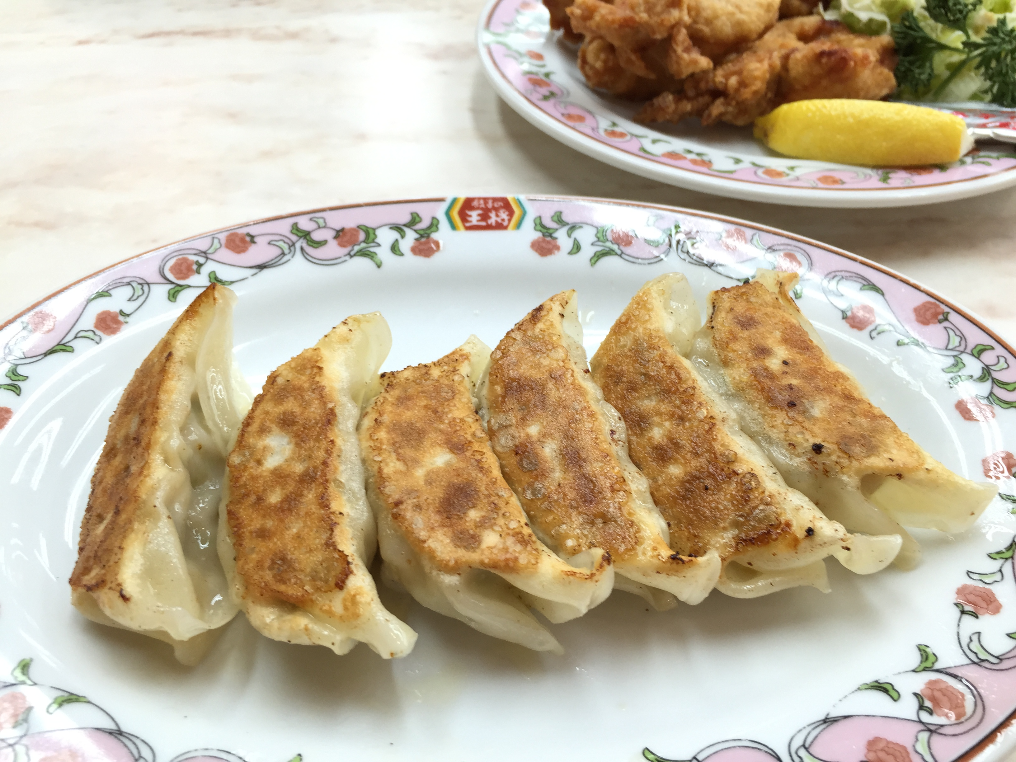 Gyoza, Matsumoto, Nagano, Japan, 餃子, 餃子の王将, 餃子的王將, アリオ松本店, 松本, まつもとし, 長野縣, 長野県, ながのけん, 日本, にっぽん, にほん